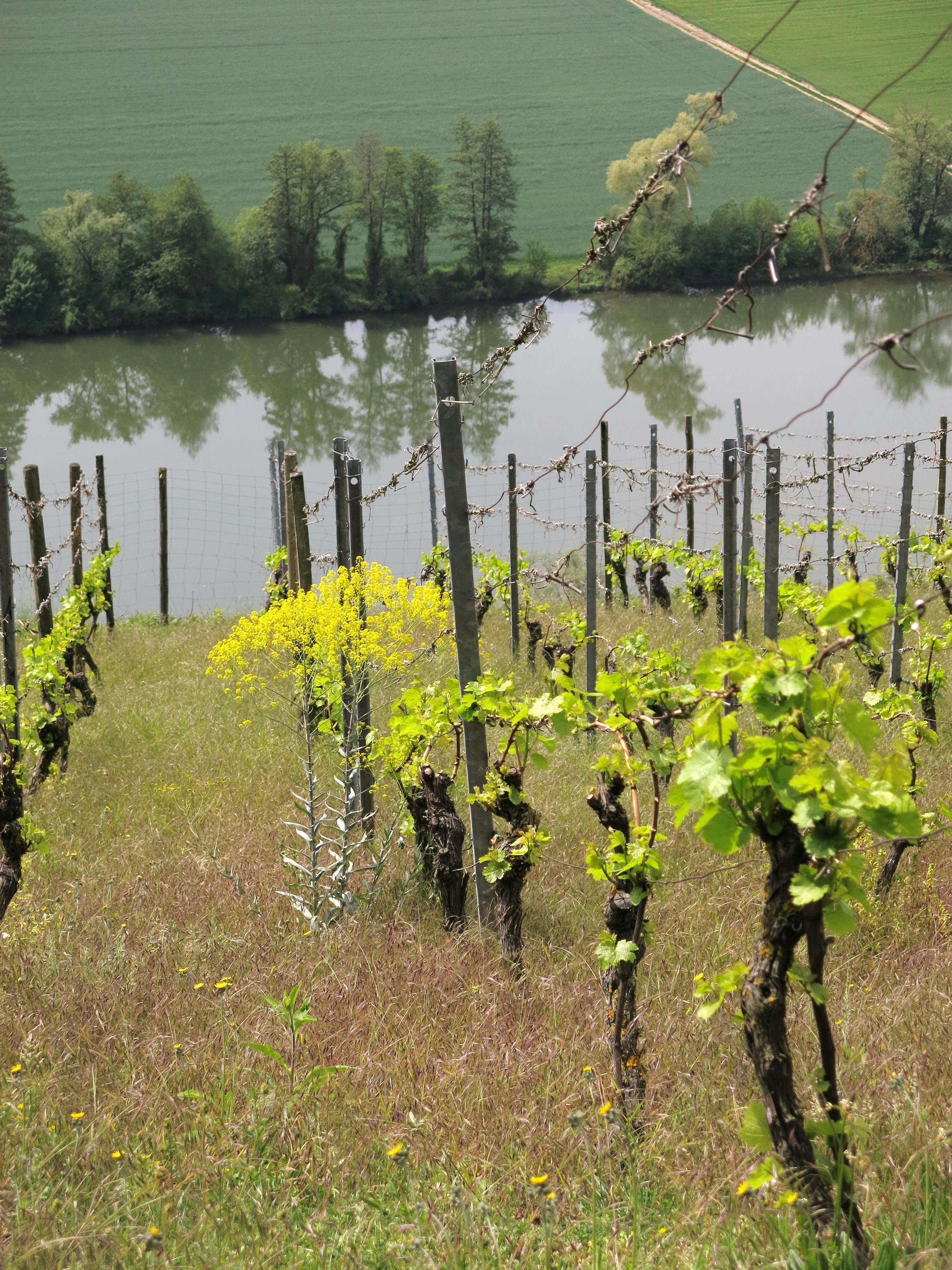 NSG Grainberg-Kalbenstein und Saupurzel, alter Weinberg am Westhang des Grainbergs - inmitten der Rebstöcke eine Färberwaid-Staude